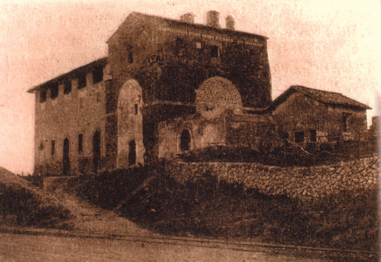 Prima Porta: casale of Malborghetto